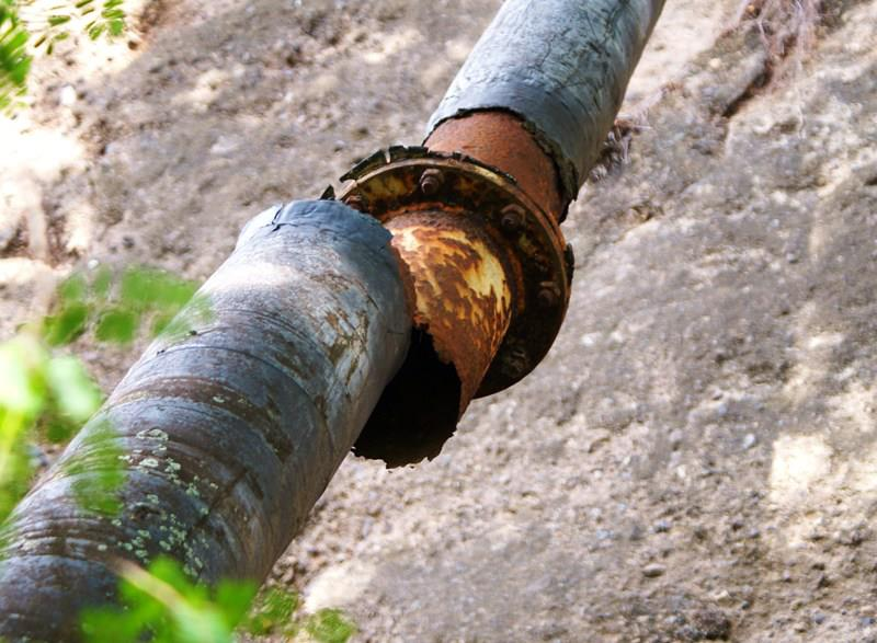 Canal en ruine.